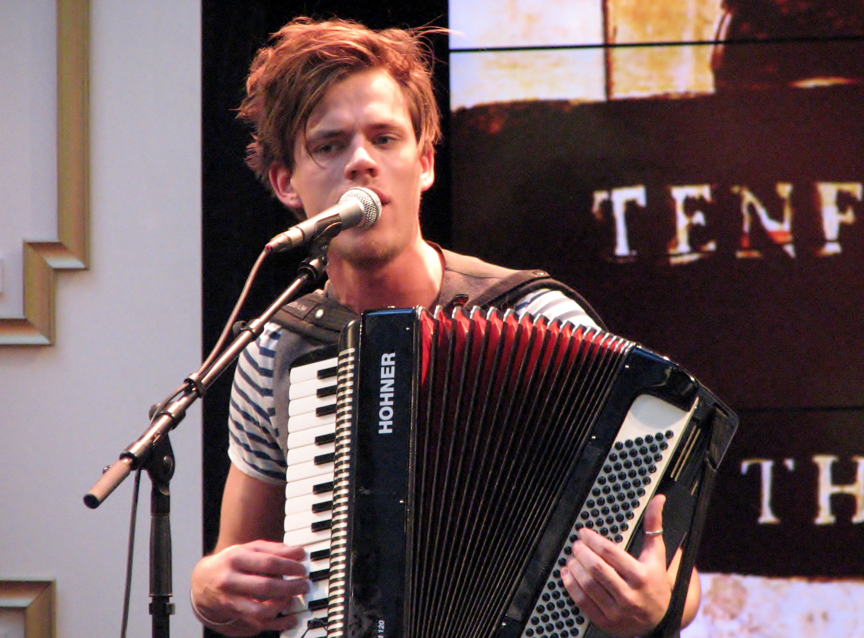 Andres Kõpper esinemas ansambliga Tenfold Rabbit Viru Keskuses FIBITil